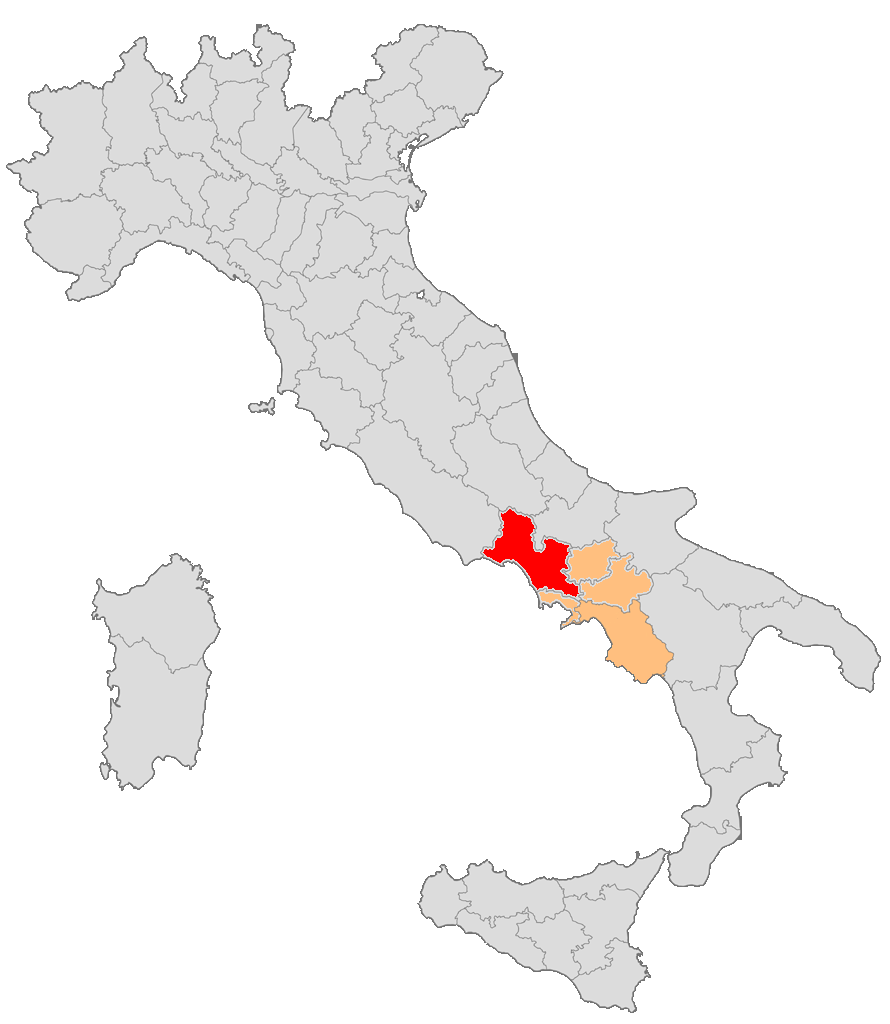 Mappa della provincia di Terra di Lavoro - Caserta (1861-1927)